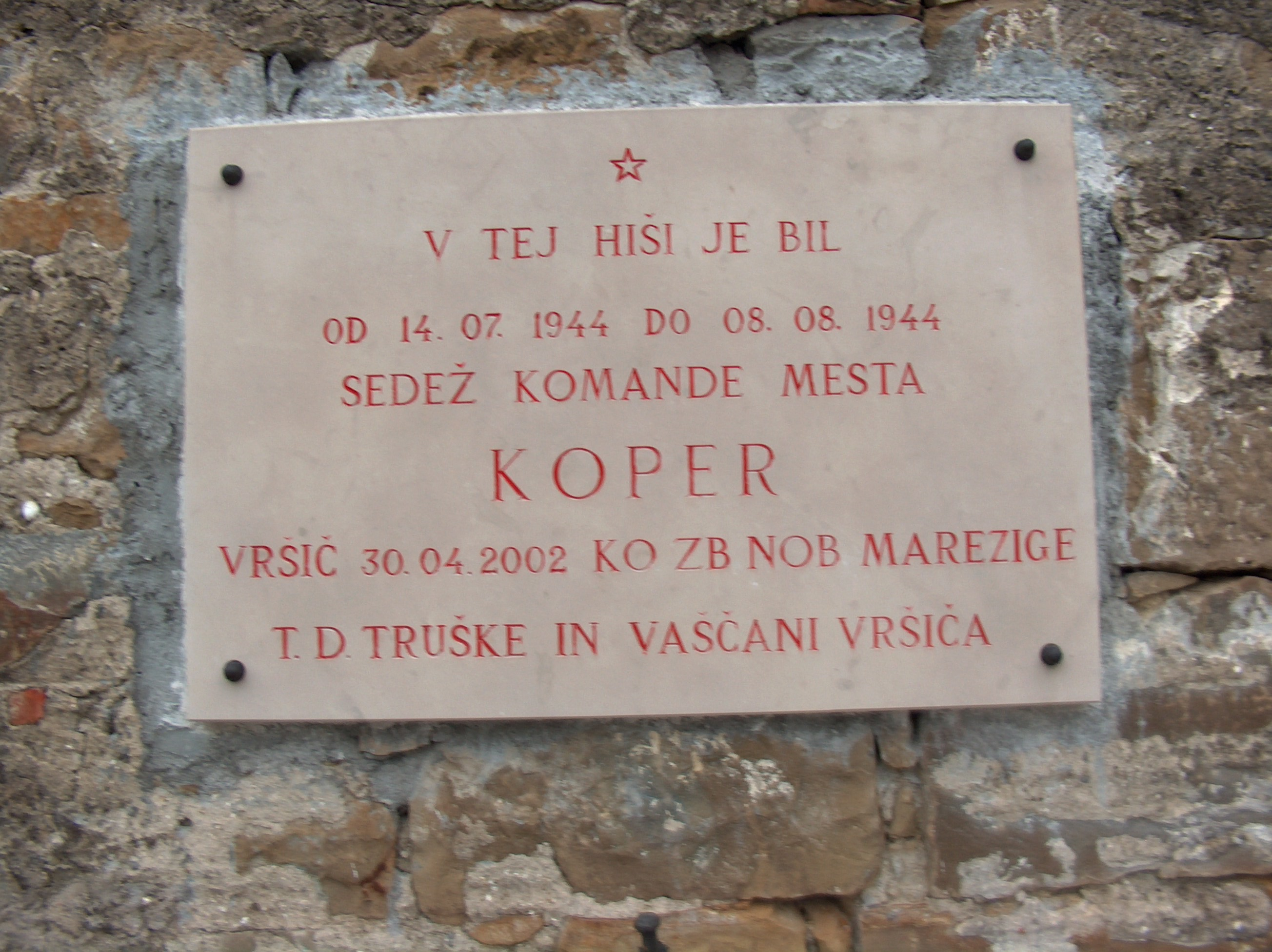 Spominska plošča v vasi Vršič.